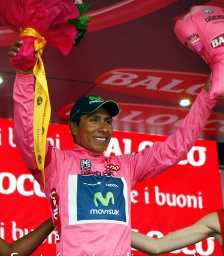 Nairo Quintana en el podio, al final de la 17ª etapa del Giro de Italia 2014